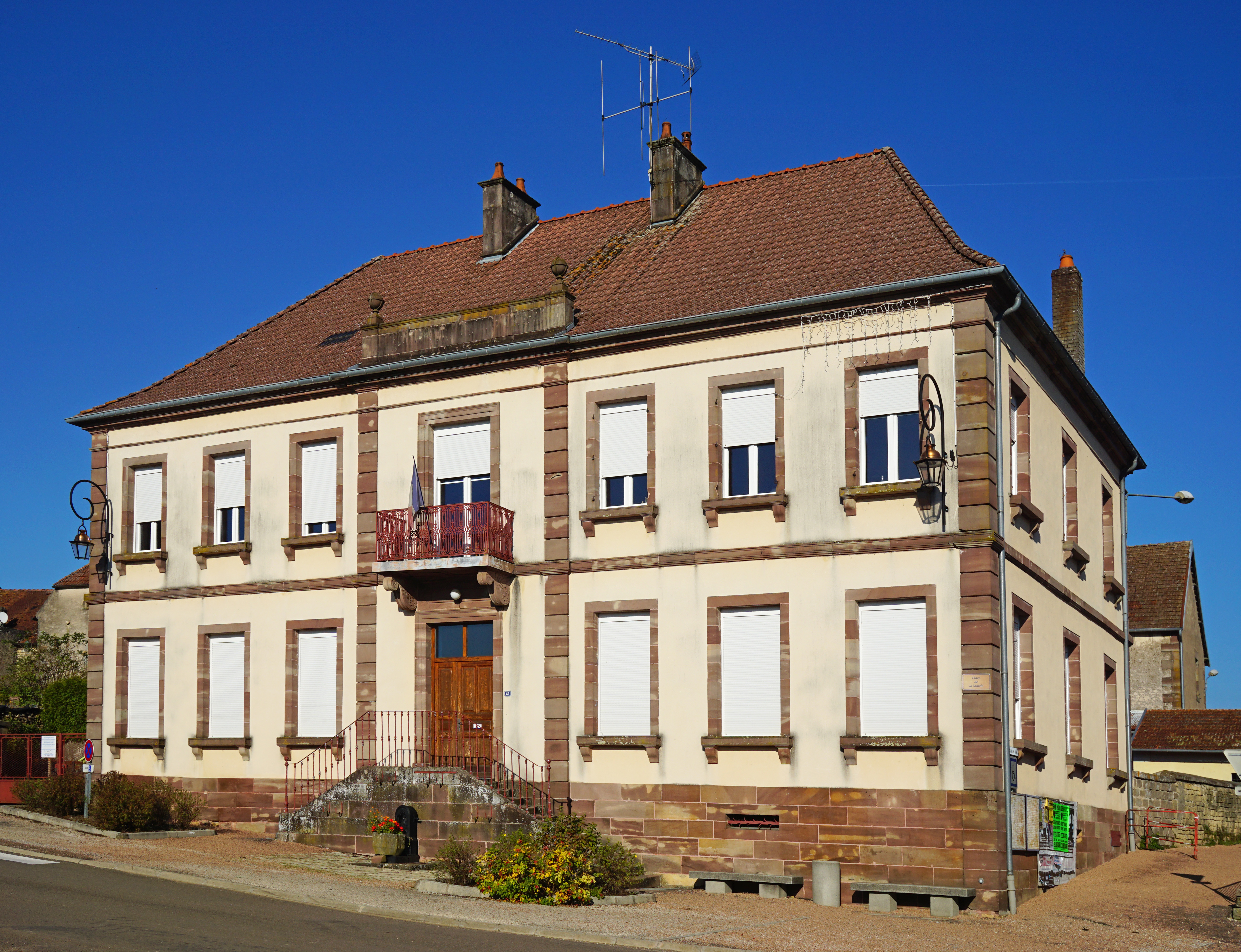 La mairie de Meurcourt.